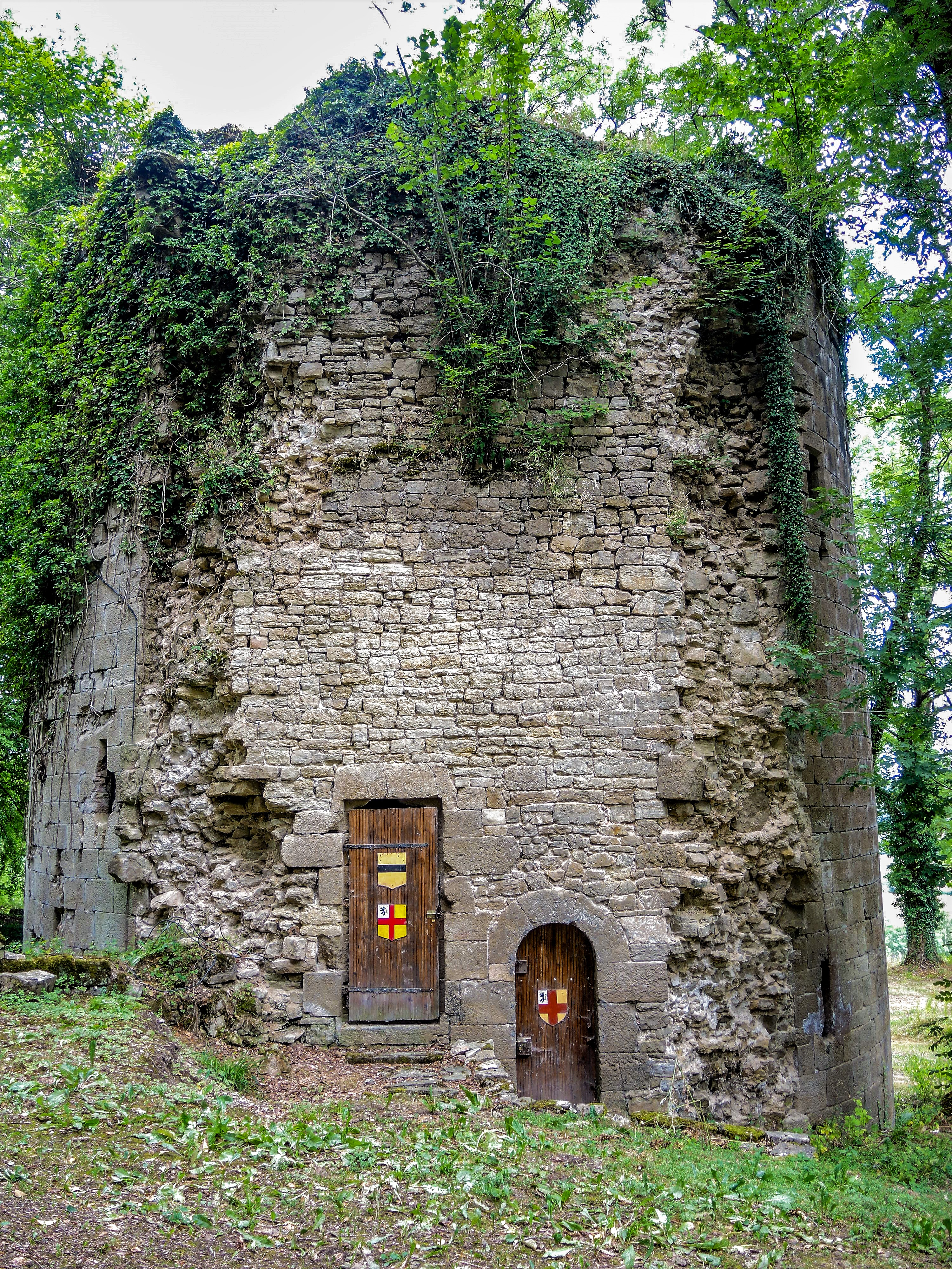 Donjon du château médiéval